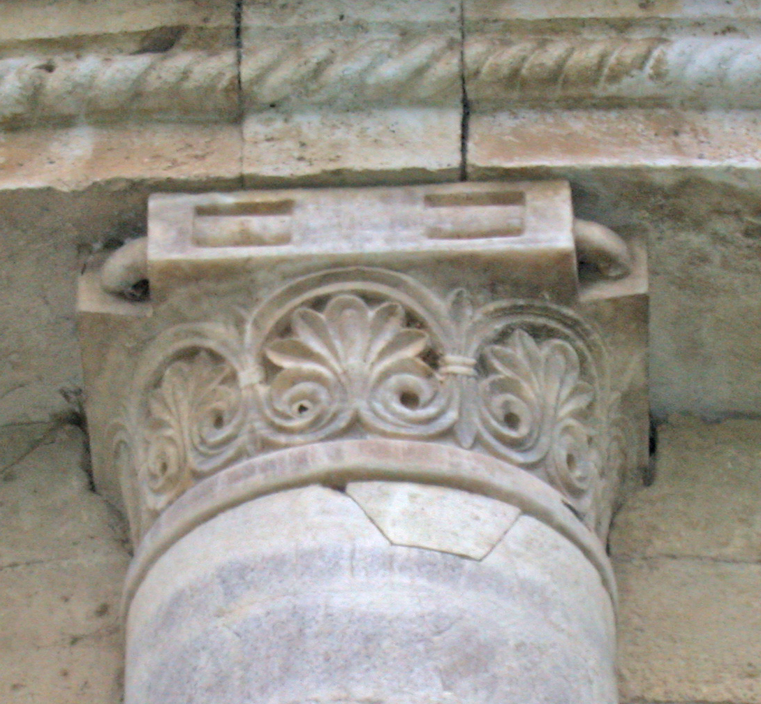 Italia, Toscana, provincia di Siena, Montalcino, Abbazia di Sant'Antimo, absidi minori, uno dei capitelli dell'esterno